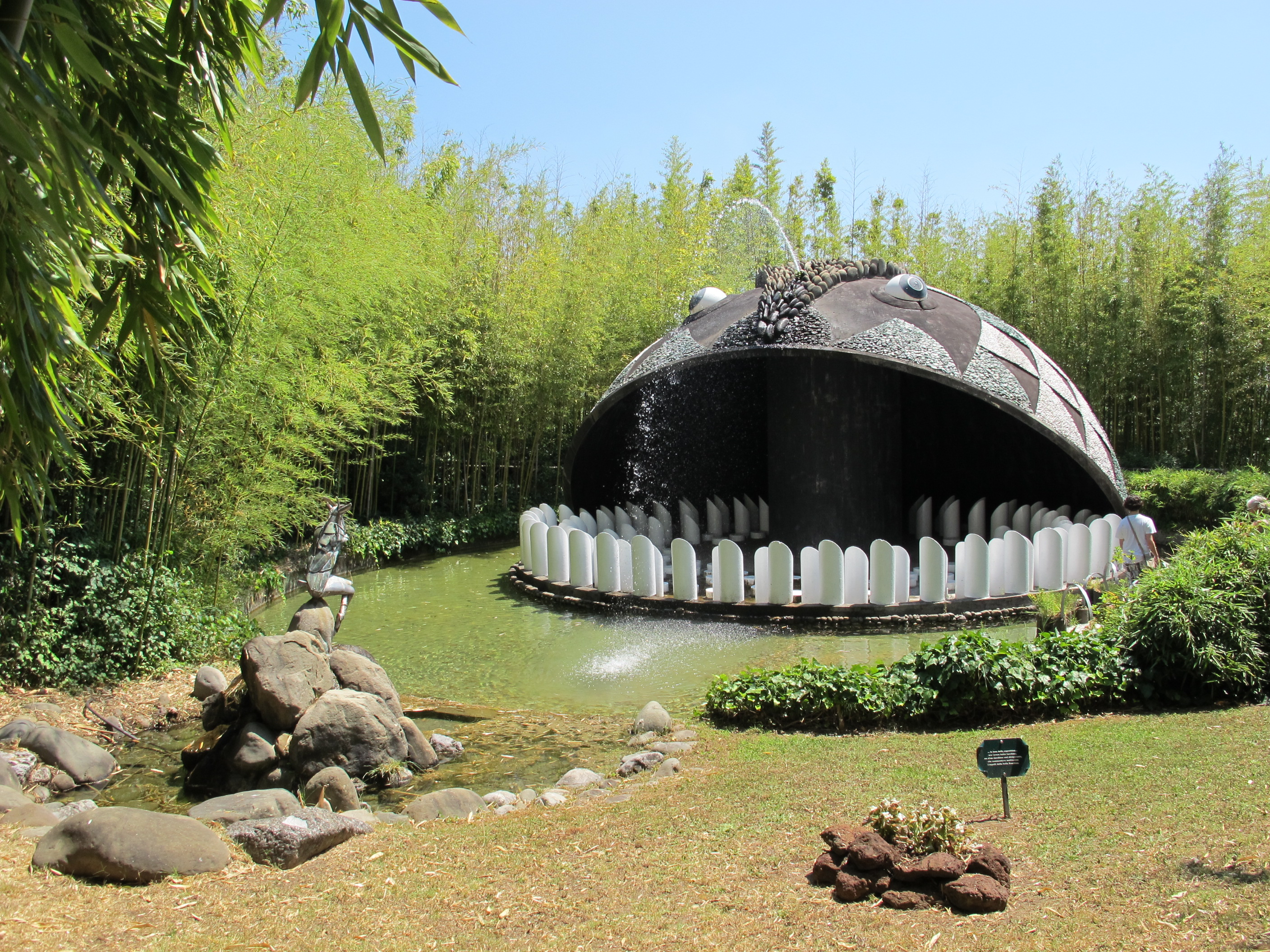 Parco di pinocchio 23 la capretta e il grande pescecane